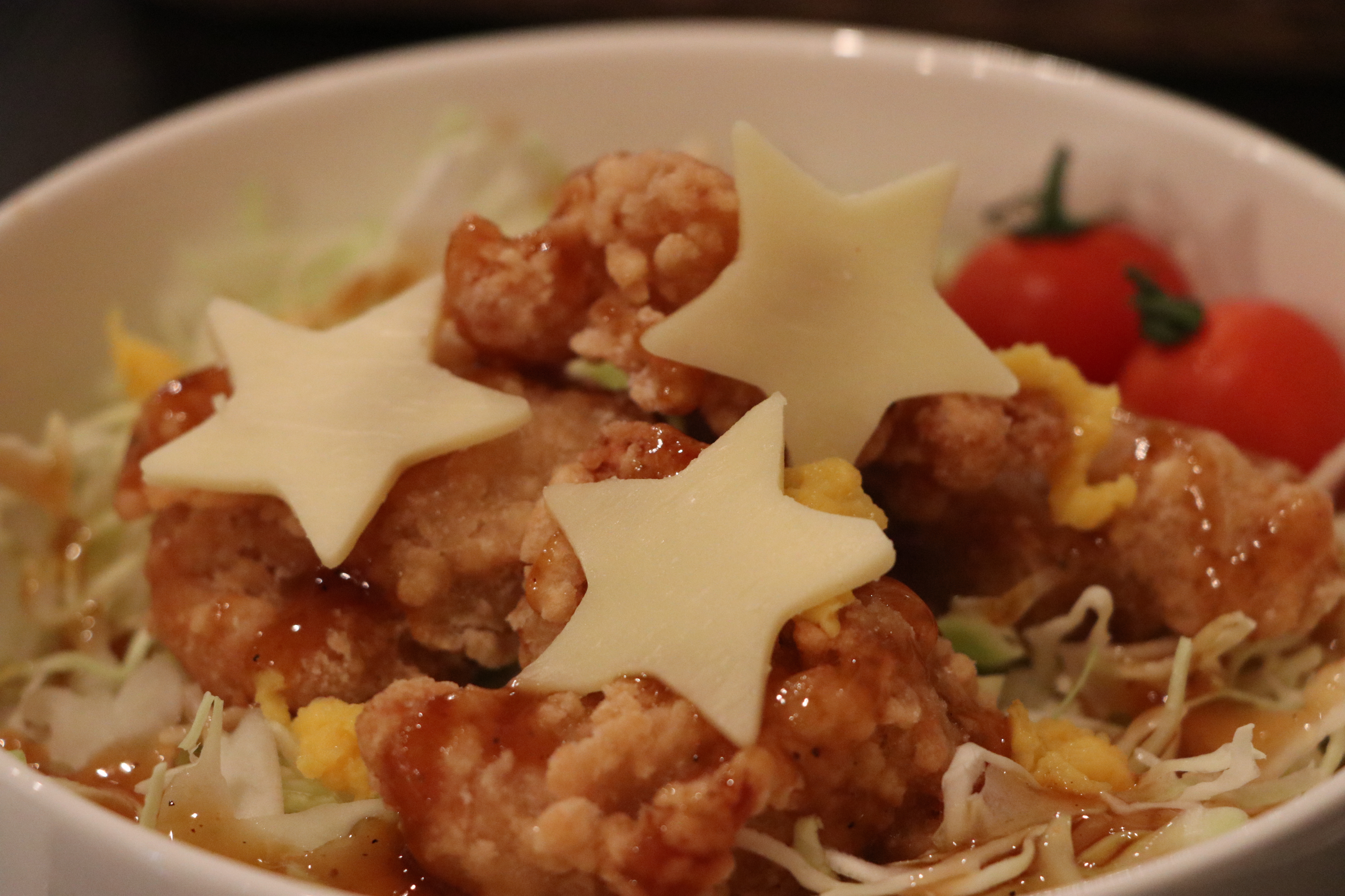 恋する小惑星とのコラボカフェで提供された「恋する小惑星丼(こいするあすてろいどん)」。唐揚げとチーズが乗っていた。